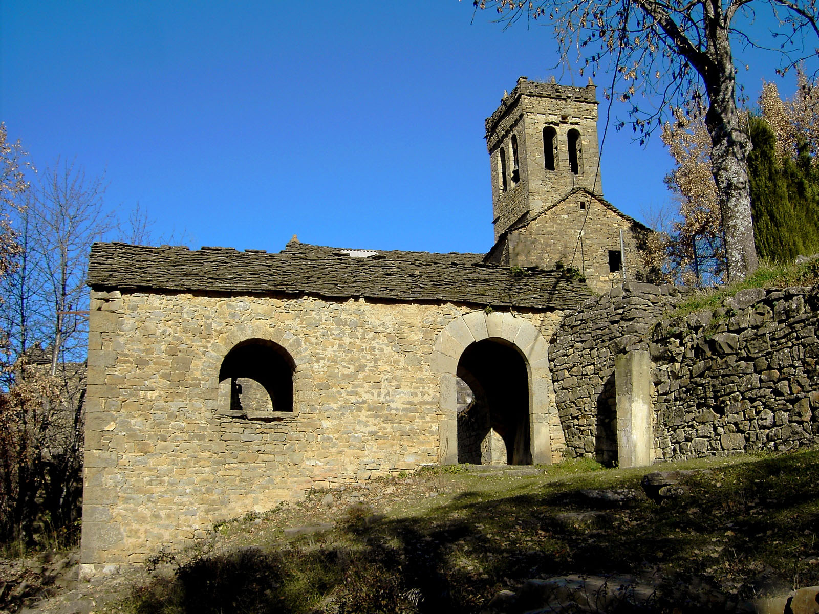 El esconjuradero de la iglesia de Asín de Broto, en la boca del Valle de Broto. Un ejemplo único de este tipo de construcciones esotéricas del Pirineo, que destaca por su planta rectangular, en lugar de la habitual planta cuadrada de esta clase de templetes.